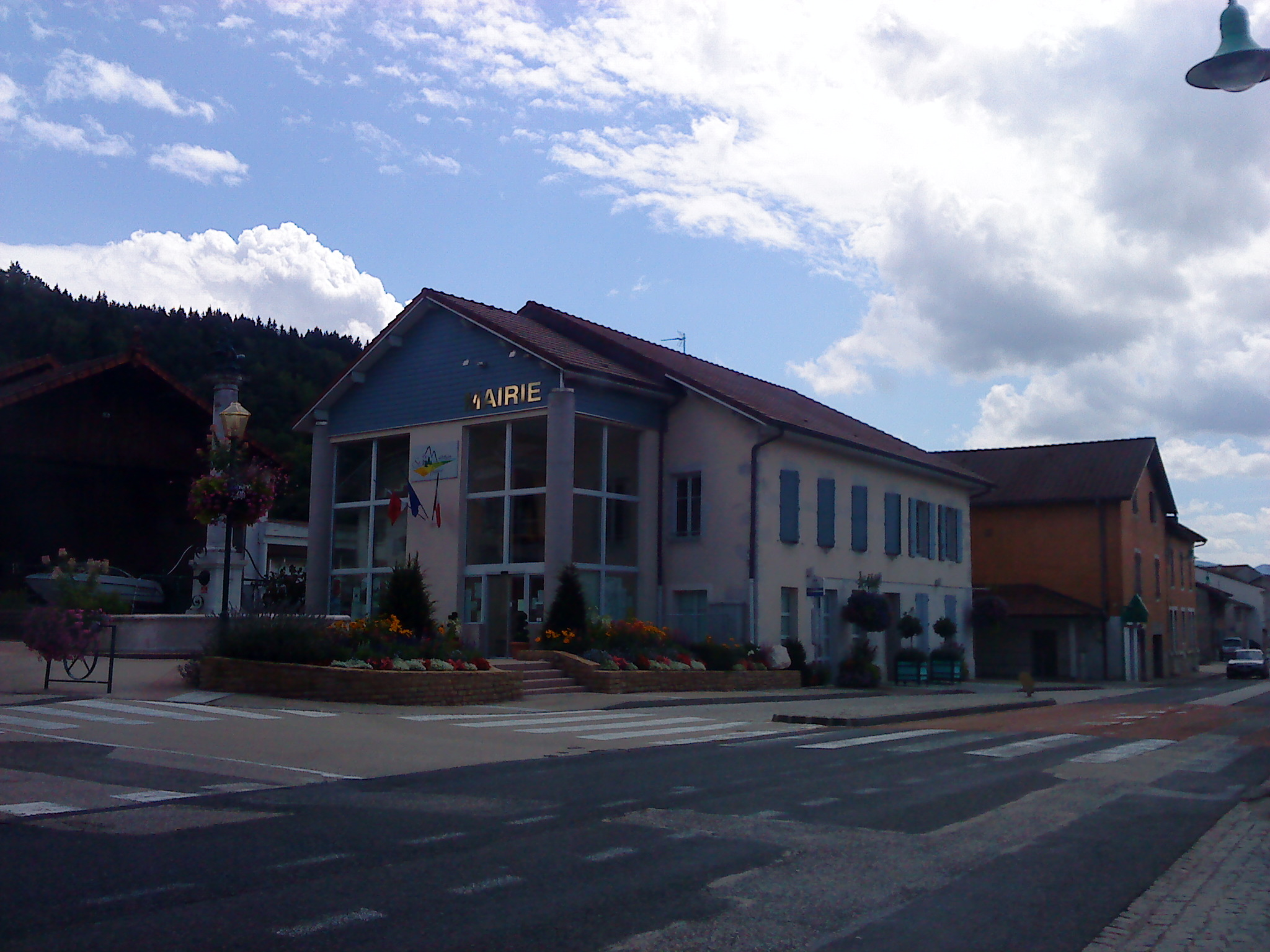 Maire de la commune de Saint-Martin-du-Frêne (Ain, France)